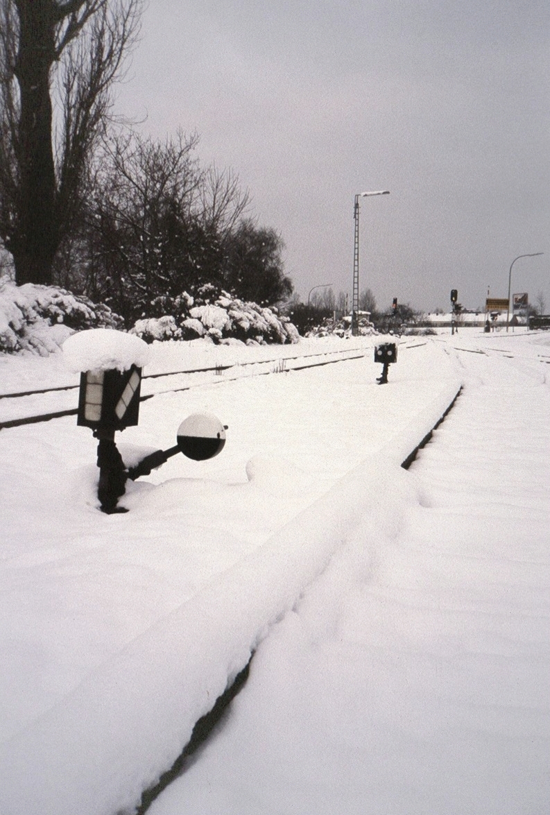 Bahnhof Bayreuth Kreuzstein (Scan von Dia)